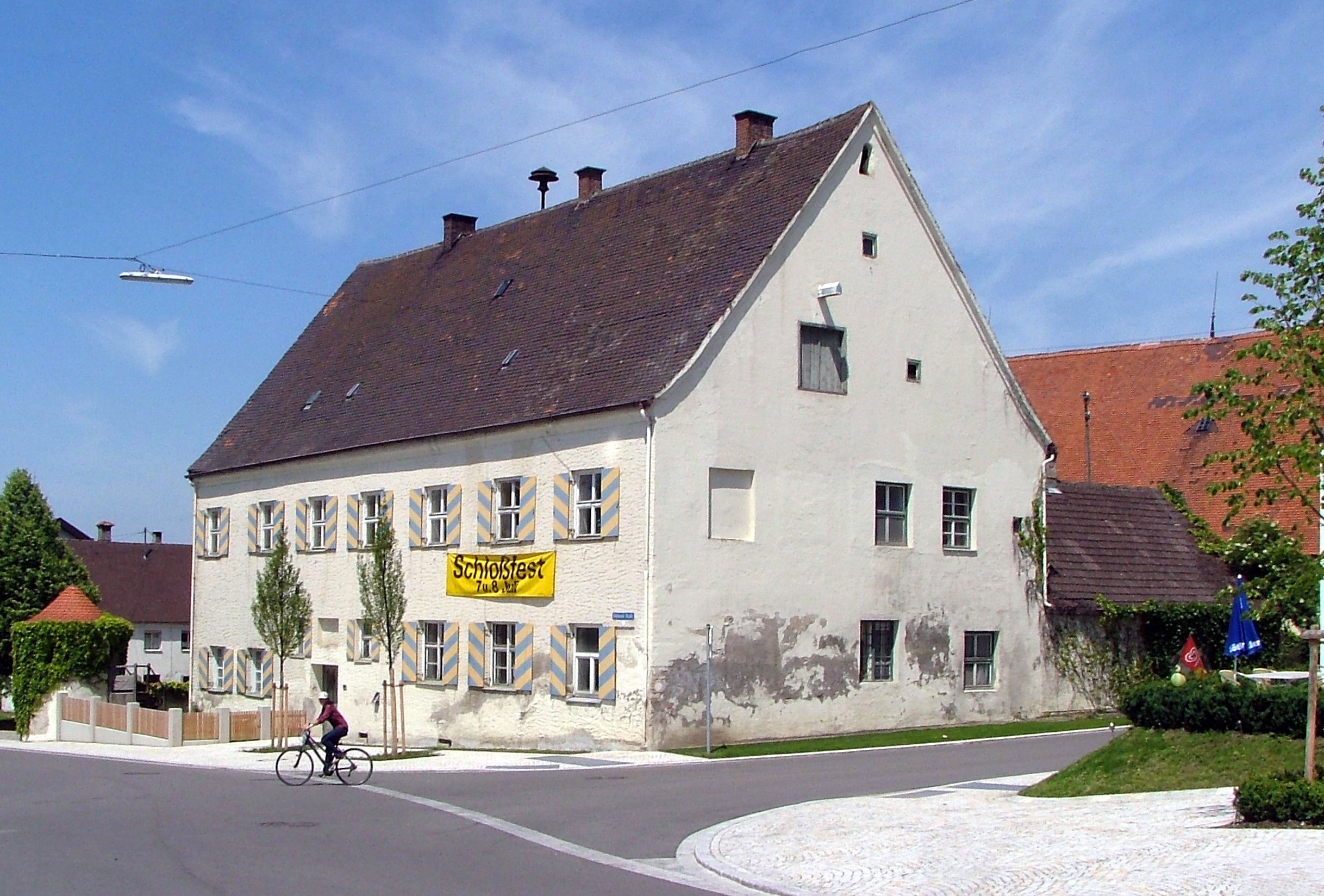 Fugger Schloss